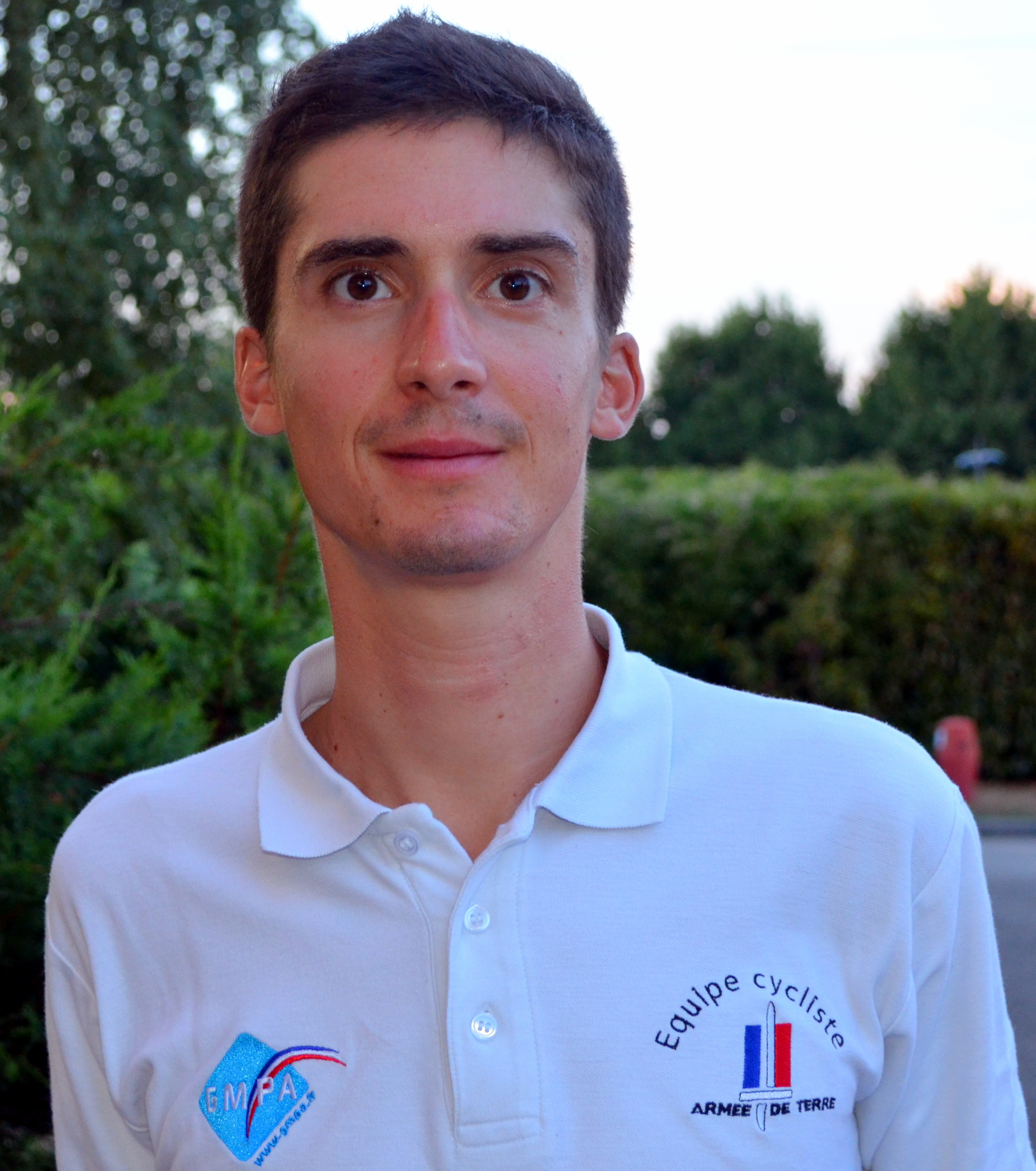 Tour de l'Ain 2015, au soir du prologue.